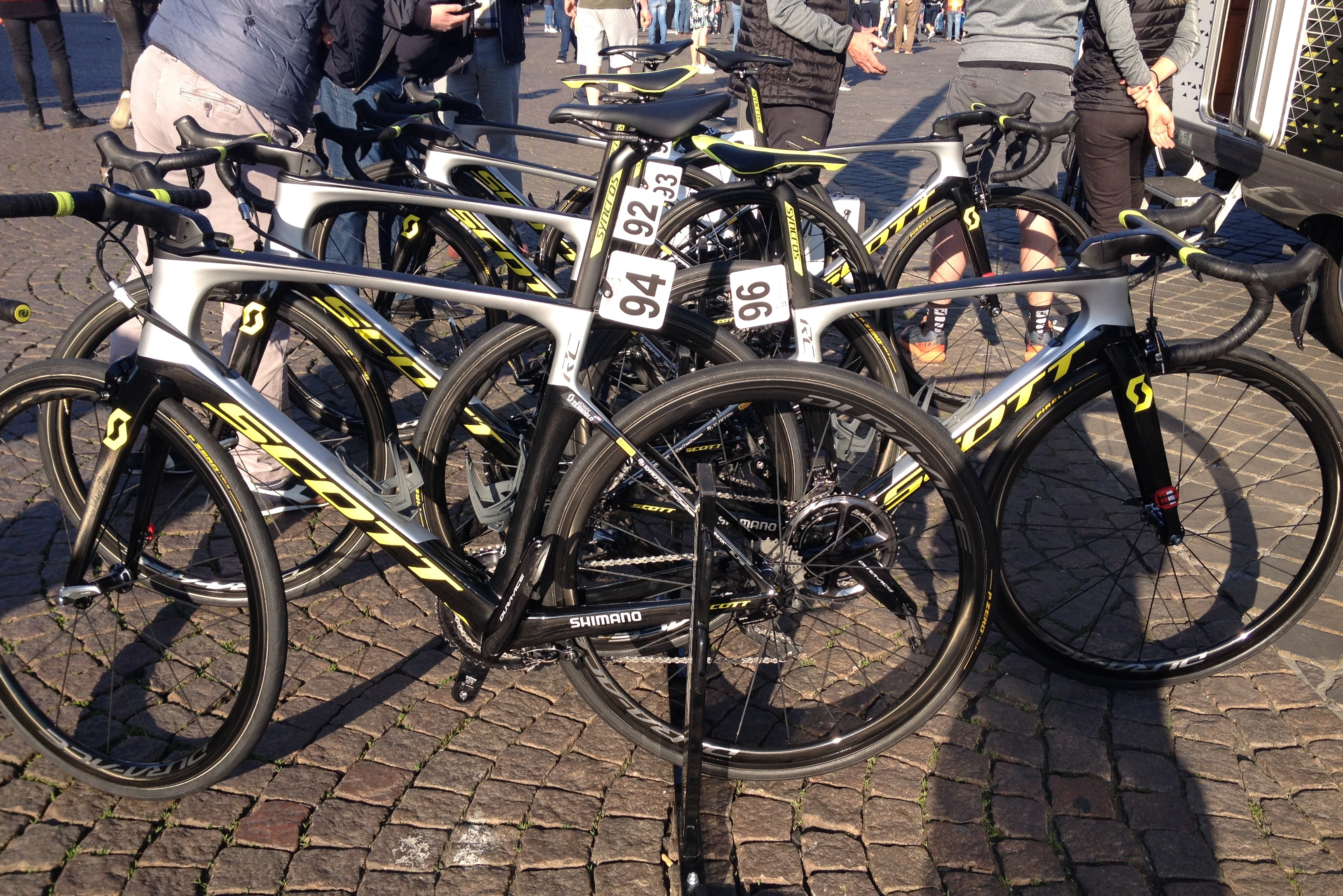 Start van de Amstel Gold Race Ladies Edition 2019 in Maastricht